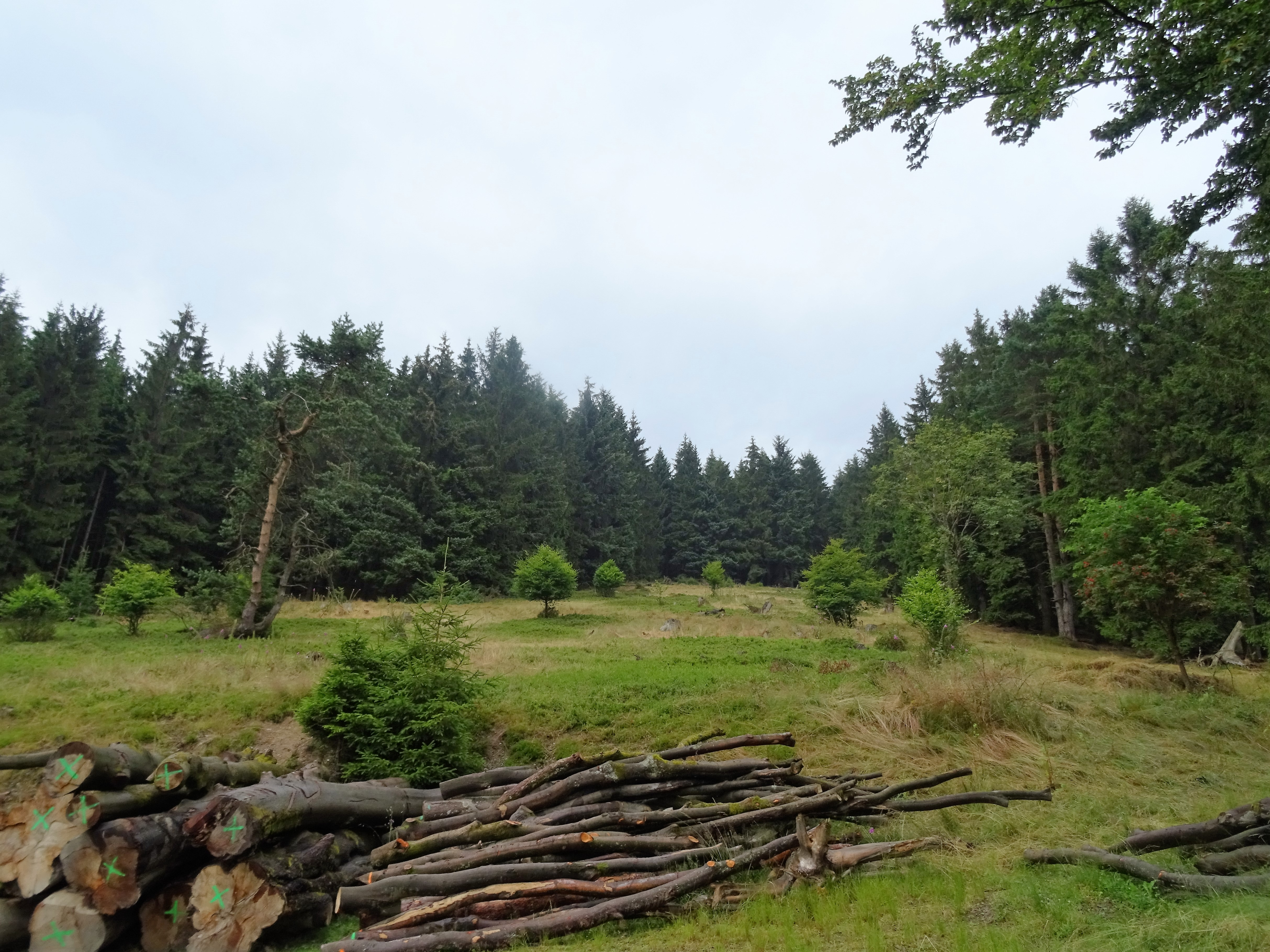 HSK-298 NSG Kahler Pön